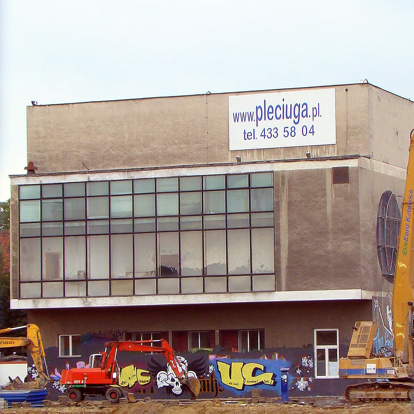 Teatr Lalek Pleciuga, (rozbiórka), Szczecin, Polska